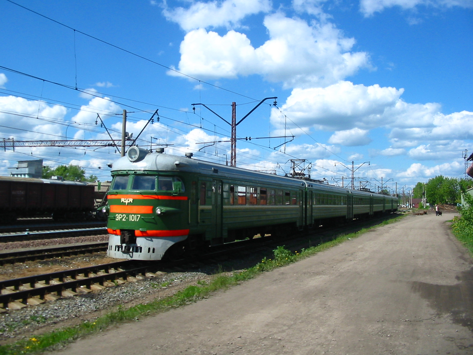 Электропоезд ЭР2-1017 построен 01.1974 в 10-вагонной составности С завода поступил в ТЧ-10 Москва-II МСК 1992 — передан в ТЧ-12 Александров МСК · С 1999 года работал исключительно на маршрутах БМО в 6-вагонной составности · КР-1 Московский ЛРЗ 08.2002 г. 15.10.2005 — передан в ТЧ-17 Нахабино МСК · 31.10.2005 — 02.11.2005 работал на участке Икша — Кубинка-I БМО · 02.11.2005 состав был снят с линии и расформирован В ночь с 3 на 4 ноября 2005 года головные вагоны 01 и 09, согласно приказа ПРИГр-119 от 02.11.2005, были отправлены назначением ст. Перово Московской ж. д. на ЗАО "Спецремонт" для переделки в "концептуальный электропоезд". На базе вагонов 01 и 09 были построены вагоны ЭМ4-01509 и ЭМ4-01501. Вагоны 02, 03, 04, 05, 06, 08, 07, 10 остались в ТЧ-17 Нахабино и использовались в качестве наполнителей. С 02.2007 года вагоны состава находились в ожидании списания по причине исчерпания ресурсного срока службы и перепробегу по ТР-3. 02.2009 исключены из инвентаря. С 6 по 20 июня вагоны 02, 03, 04, 06, 07, 10 разрезаны в депо Нахабино. Электропоезд ЭР2-1017 был последним круглоголовым составом серии ЭР2 на Московской ж. д. * * Электропоезд ЭМ4-015 сформирован при проведении КРП на Московском ЛРЗ (ЗАО "Спецремонт") со следующей сменой нумерации вагонов: ЭМ4-01501 — ЭР2-101709 ЭМ4-01502 — ЭР2-111210 ЭМ4-01503 — ЭР2-111703 ЭМ4-01504 — ЭР2-111704 ЭМ4-01506 — ЭР2-111706 ЭМ4-01505 — ЭР2-111705 ЭМ4-01510 — ЭР2-111202 ЭМ4-01509 — ЭР2-101701 03.2006 — после прохождения КРП поступил в ТЧ-10 Москва-II МСК 07-09.2012 — носил именное название «175 лет железным дорогам России» 08.11.2013 — передан в ТЧ-7 Раменское МСК 12.12.2014 — последний день работы с пассажирами 13.12.2014 — отставлен oт эксплуатации, проведена консервация 09.03.2016 — вместе с ЭМ4-008 покинул депо Раменское, передислоцирован на станцию Курск С 04.2016 находится на консервации в ТЧ-22 Новомосковск-I в качестве донора запчастей